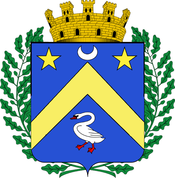 Blason de la ville de Chaudon